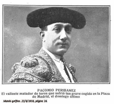 el torero Pacomio Peribáñez marido de Araceli Sanchez Imaz